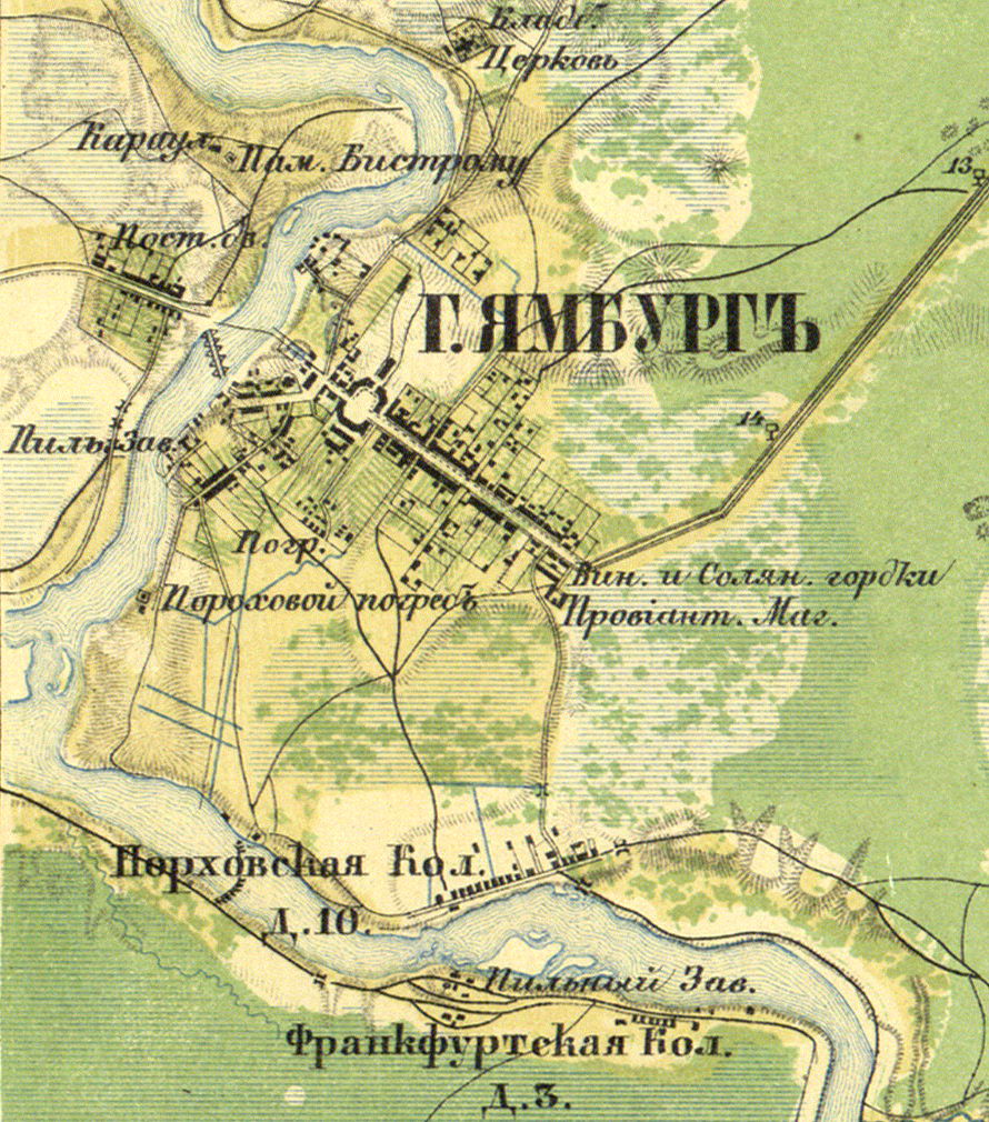 Ямбург на карте 1860 года.